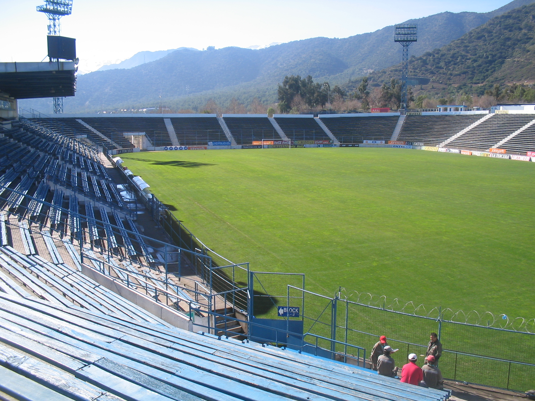 Estadio San Carlos de Apoquindo, Las Condes, Santiago de Chile